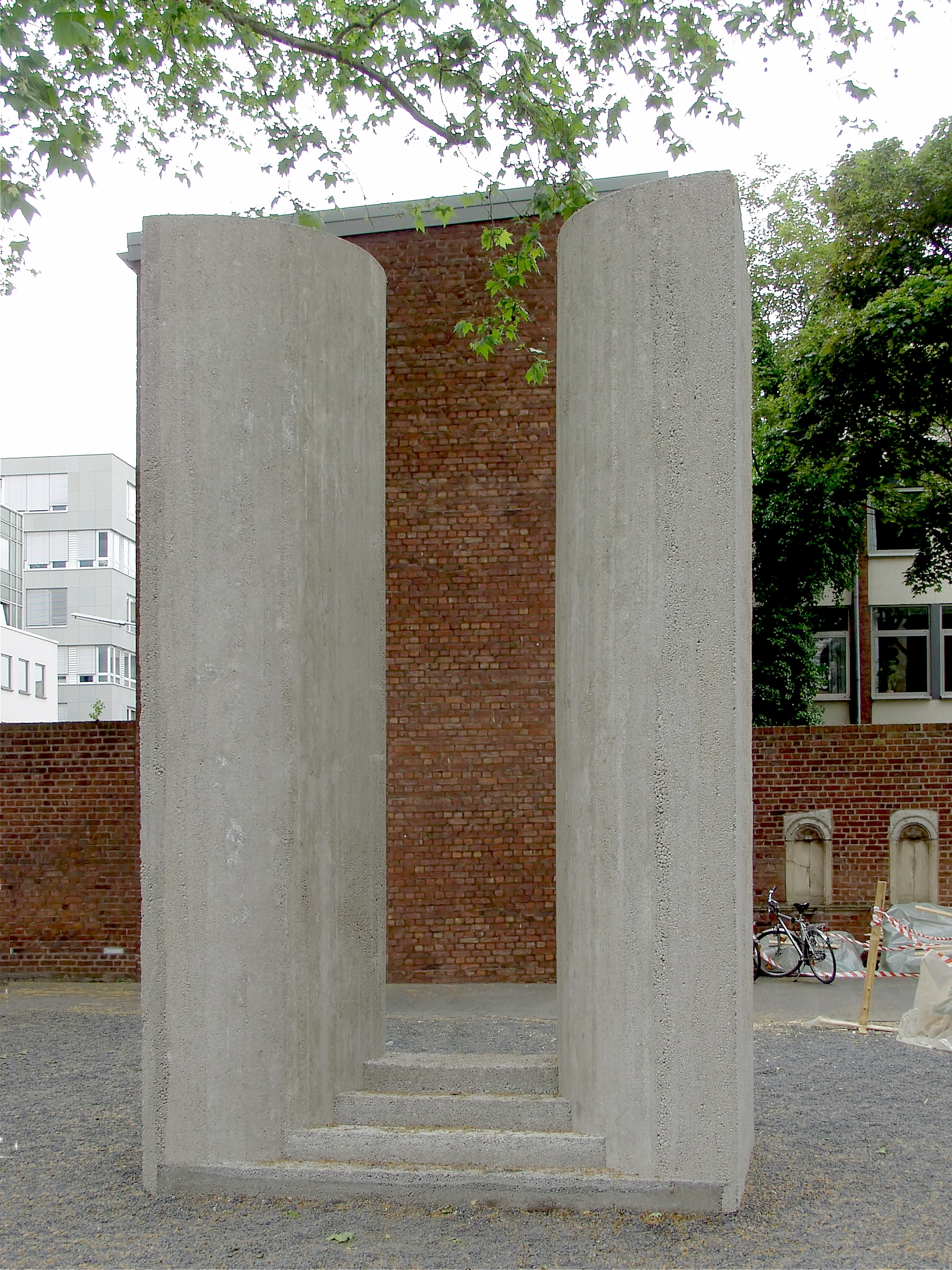 Skultpur „Forum“ vor der Kirche St. Peter (Köln). Künstler: Simon Ungers